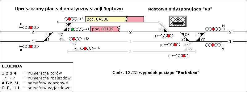 Reptowo 5 maja 1997 godz. 12:25 wypadek pociągu "Barbakan"